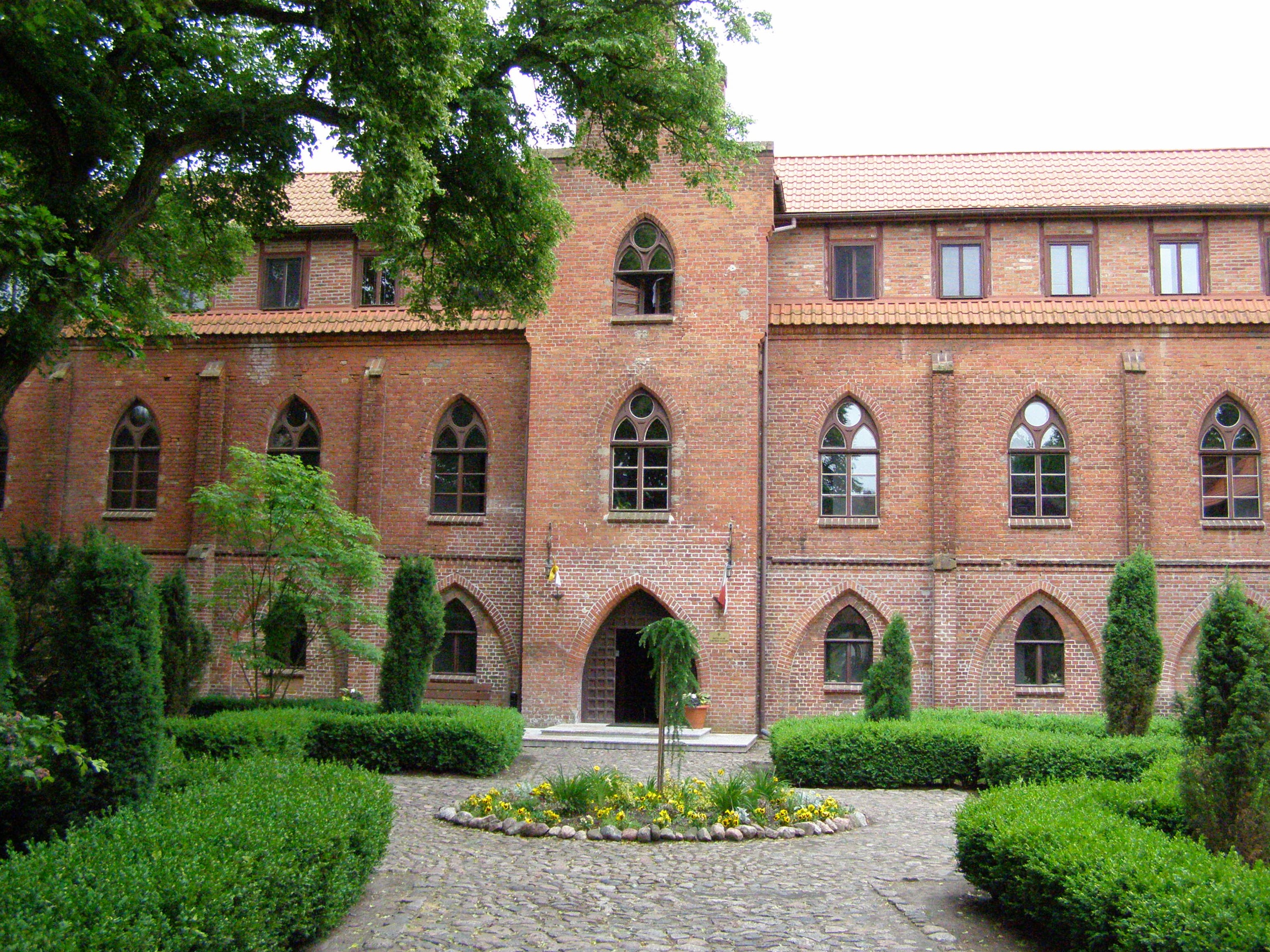 Zamek Bierzgłowski - dziedziniec